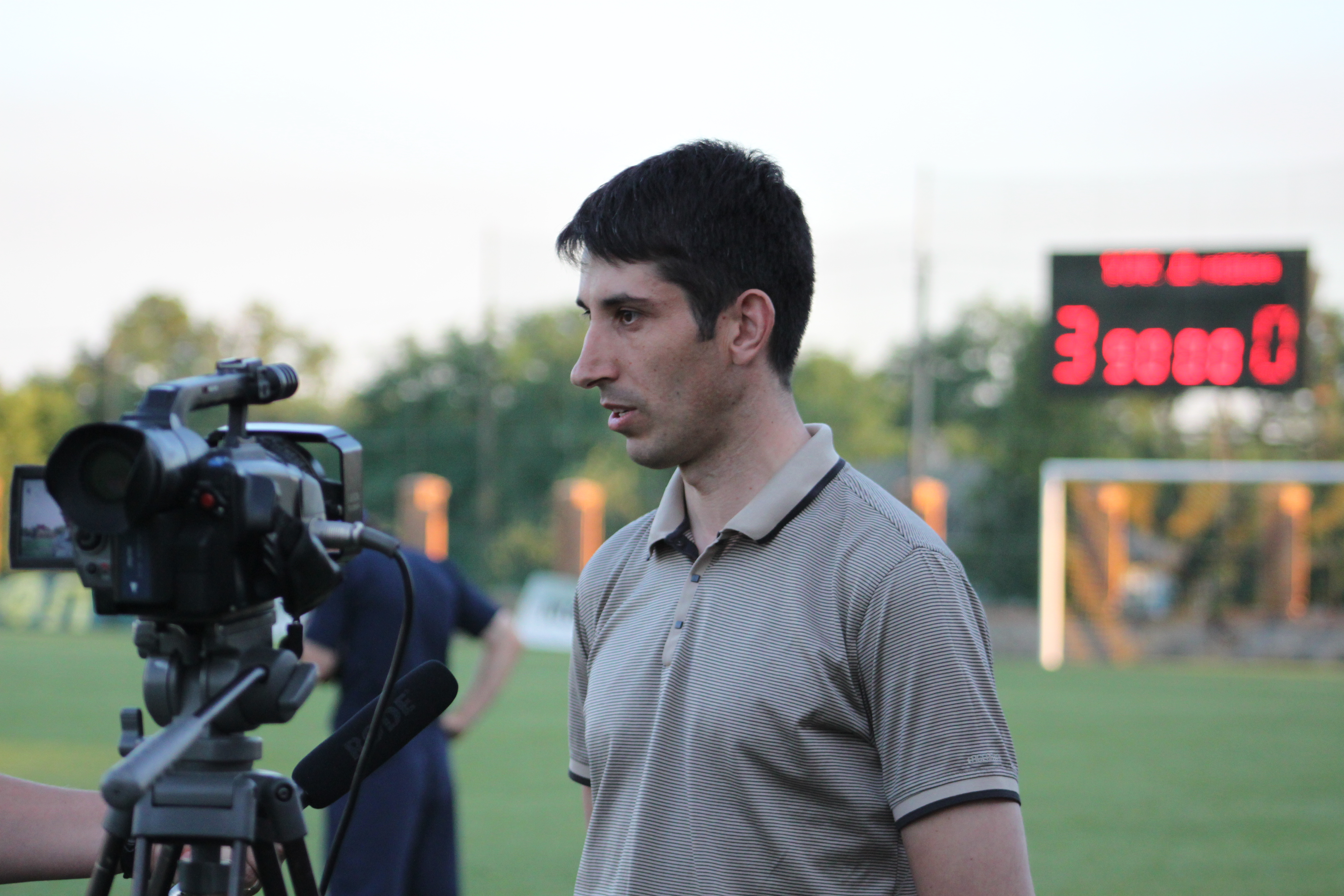 Історичне інтерв'ю Сергія Кузьменка після першого матчу ПФК «УкрАгроКом» в ПФЛ, 23.07.2011 року